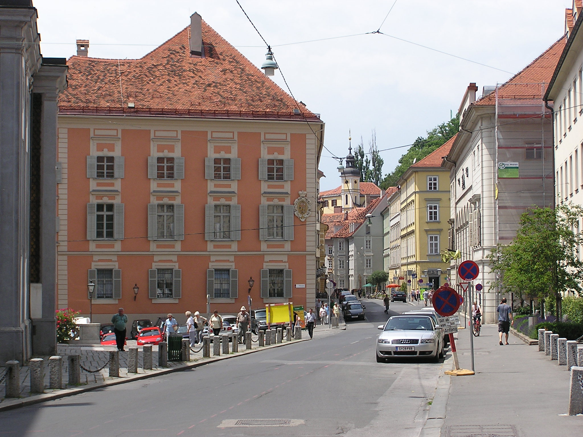 Alte Universität (Jesuitenuniversität) mit Blick in die Hofgasse